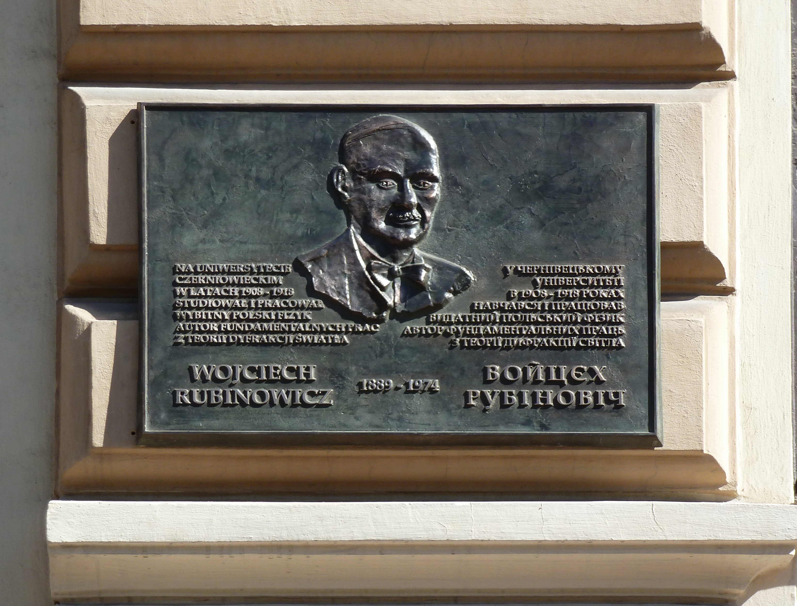 Tablica pamiątkowa na budynku Uniwersytetu w Czerniowcach